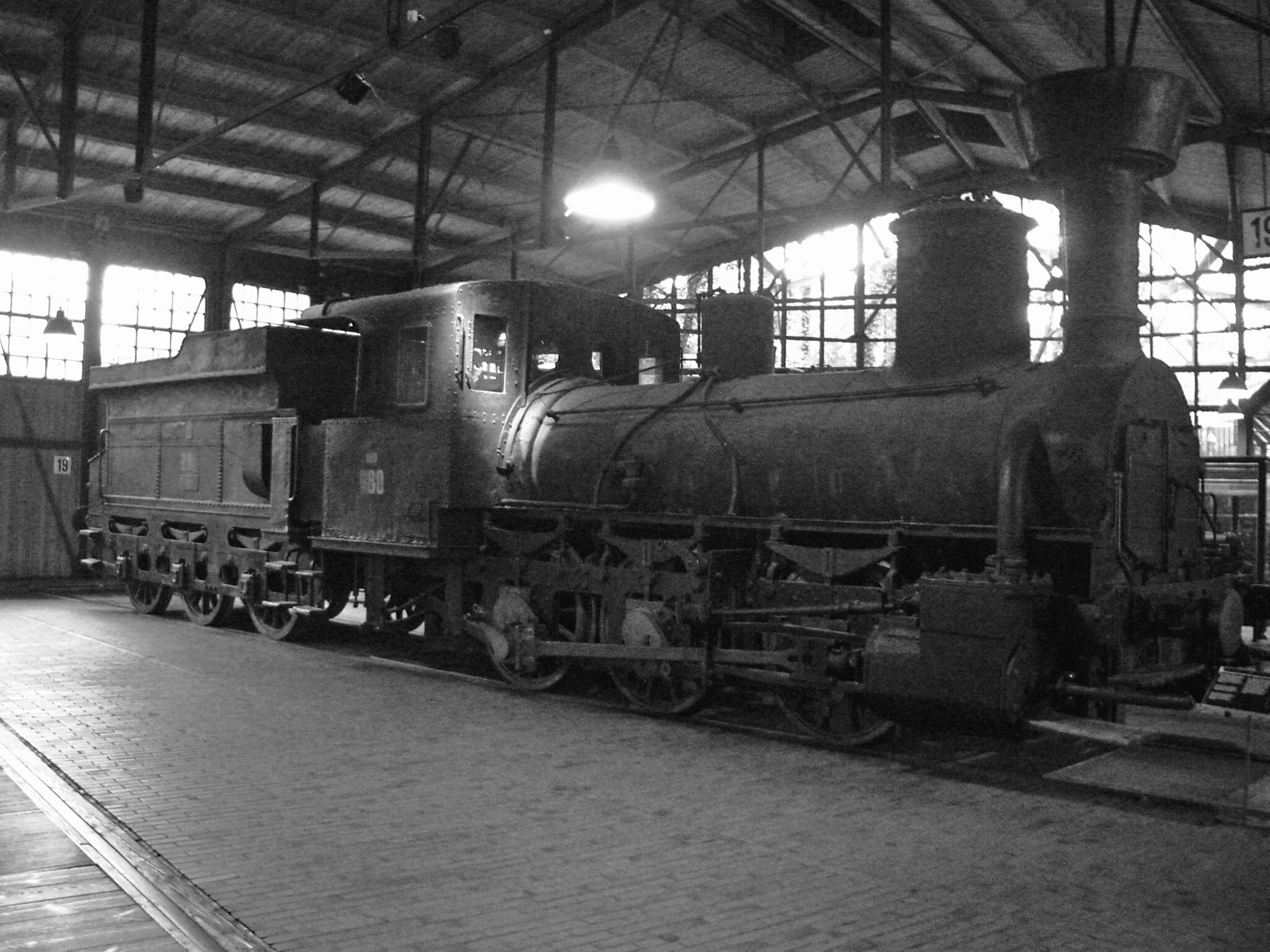 Güterzuglokomotive der österreichischen Südbahn aus den Jahr 1860, Hersteller: Lokomotivfabrik der Staats-Eisenbahn-Gesellschaft (StEG) Baunummer 680